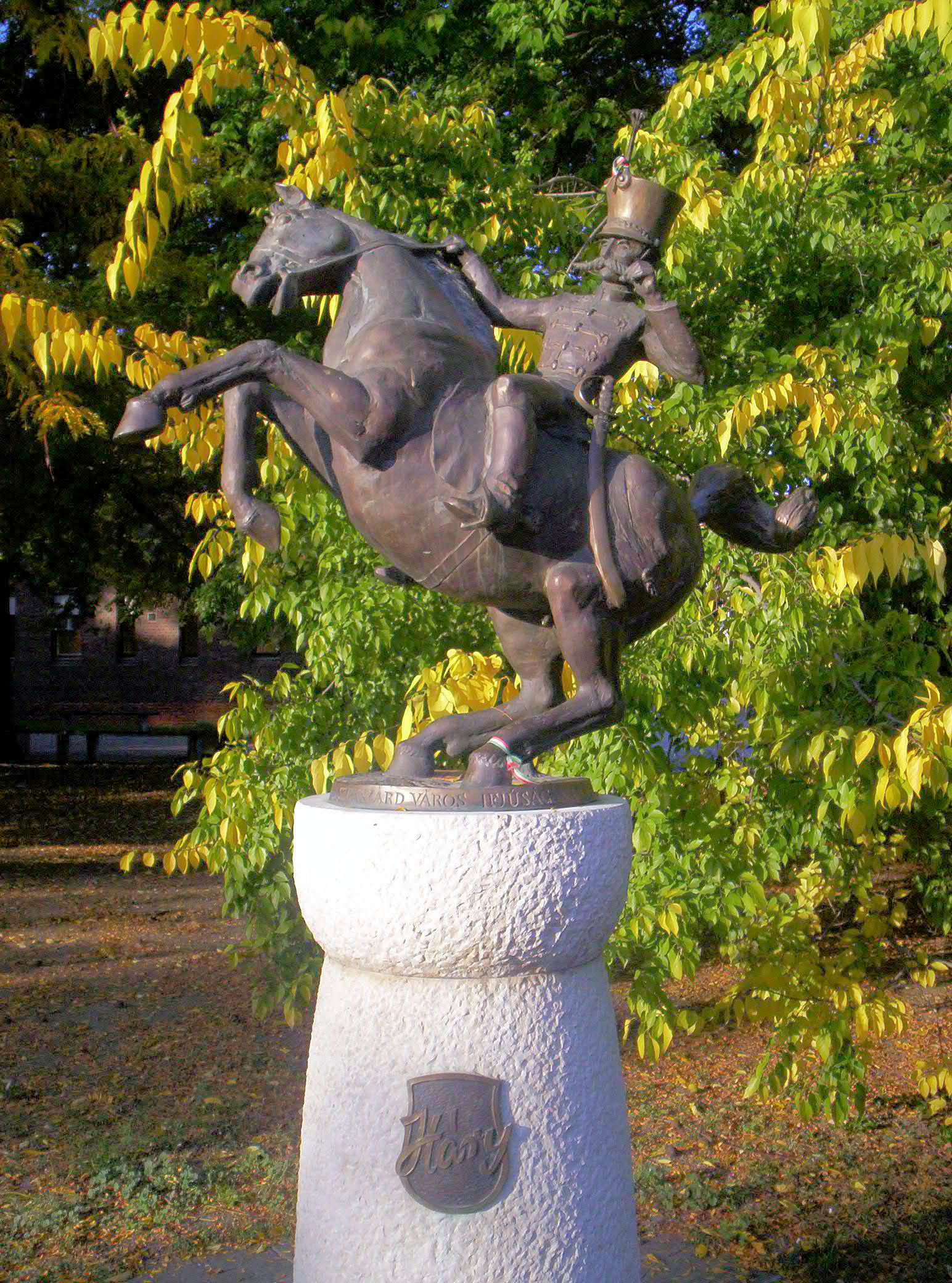 Háry János-szobor Szekszárdon. Farkas Pál alkotása (1992). – photo taken by uploader User:Csanády in 2006.